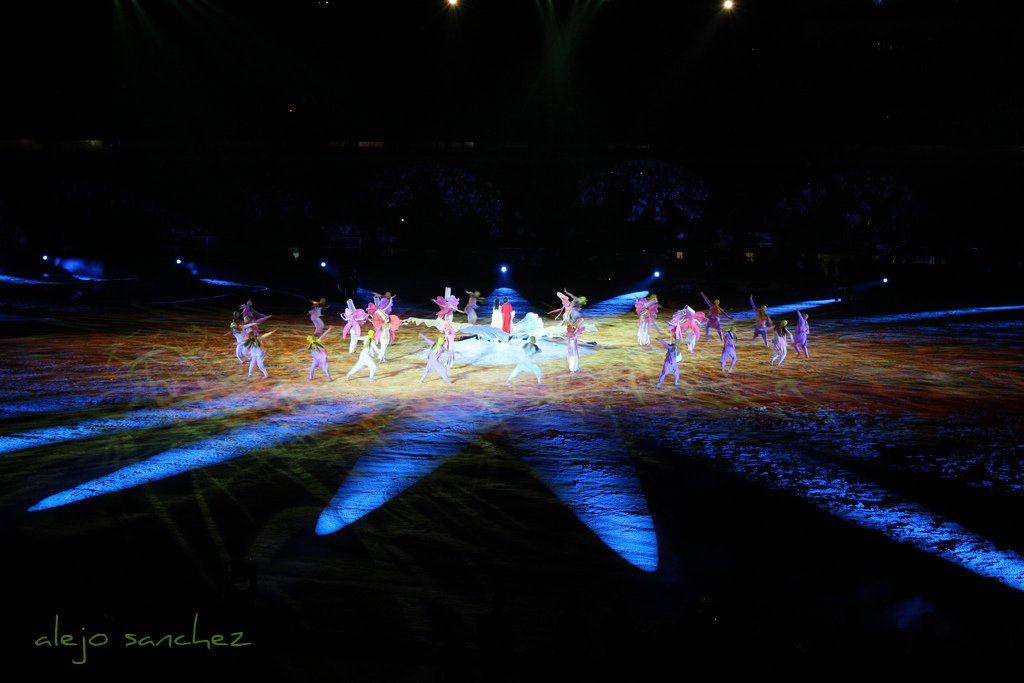 Ceremonia de apertura de los Juegos Sudamericanos de 2010